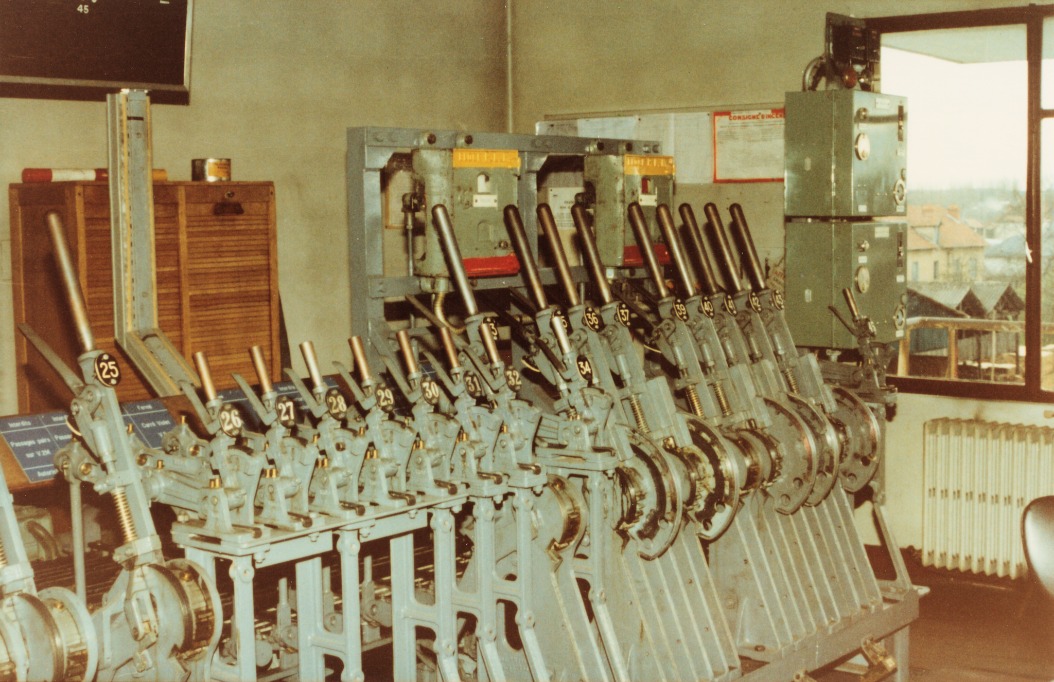 France - Ligne de Paray Le Monial à Moulins - Paray Le Monial - Poste 2 de type mécanique 45